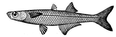 Tidewater silverside (Menidia peninsulae)